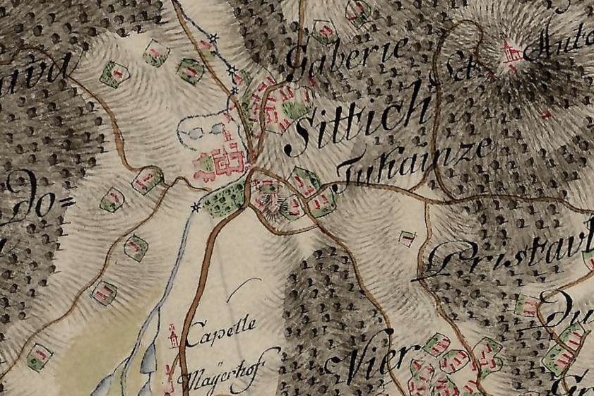 Stična na jožefinskem vojaškem zemljevidu iz let 1763-1787